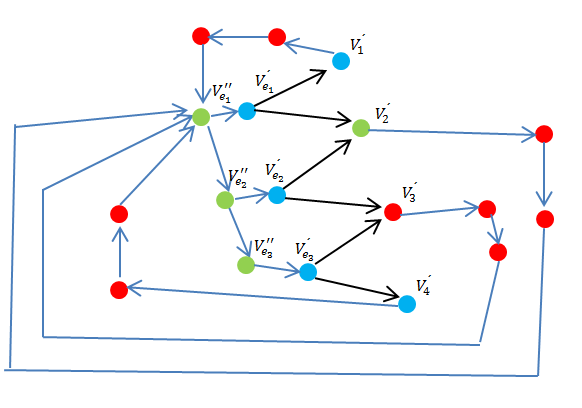 Paso 3 de la contrucción